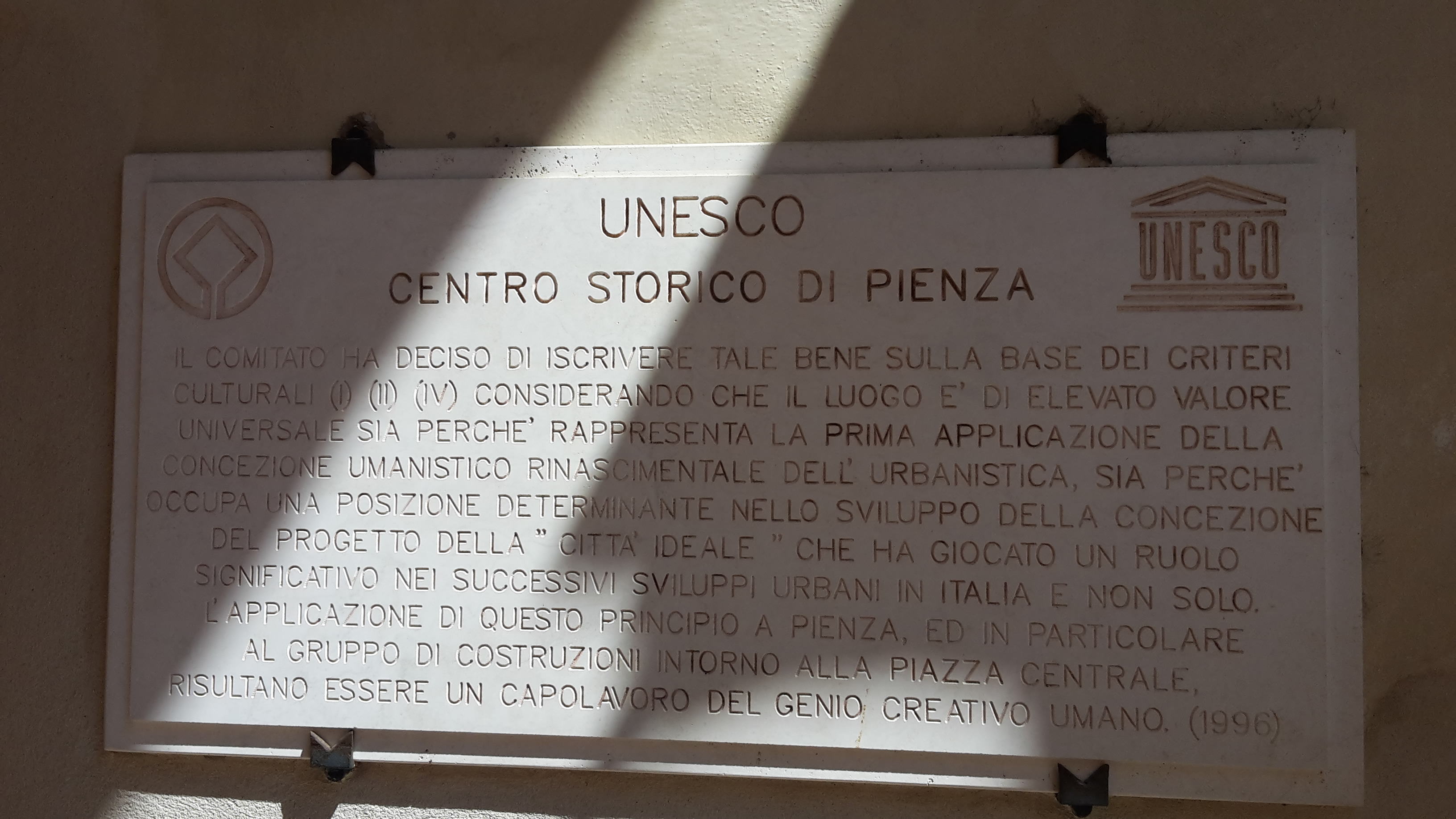 Targa UNESCO a Pienza